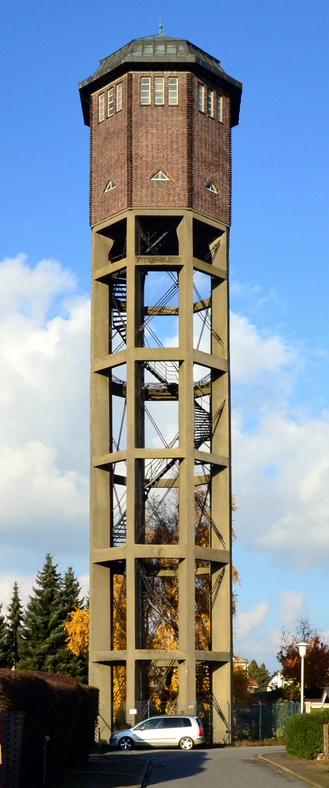 Der Wasserturm in Uetersen 2012